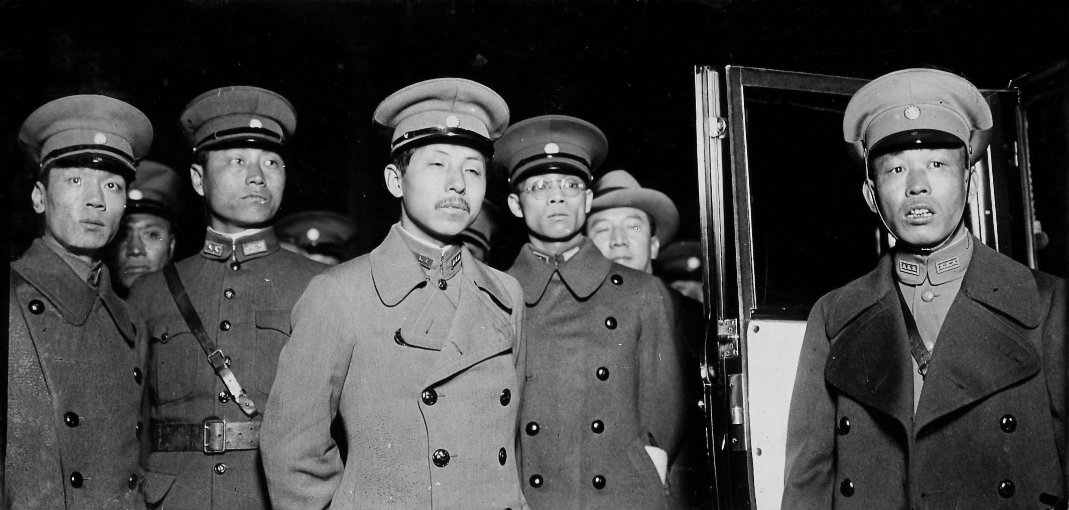 北平に到着した張学良。左二名は察哈爾省政府主席・劉翼飛および陸海空軍副司令行営総務処処長・朱光沐。右より二人目は東北辺防軍司令長官公署秘書兼軍事庁軍衛処副処長の湯国楨。